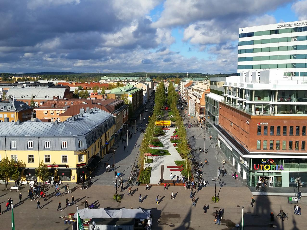 Rådhusesplanaden i Umeå, vy från Rådhuset.